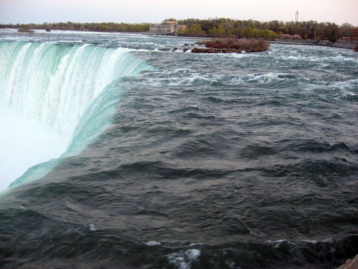 Линия падения воды на водопаде Подкова